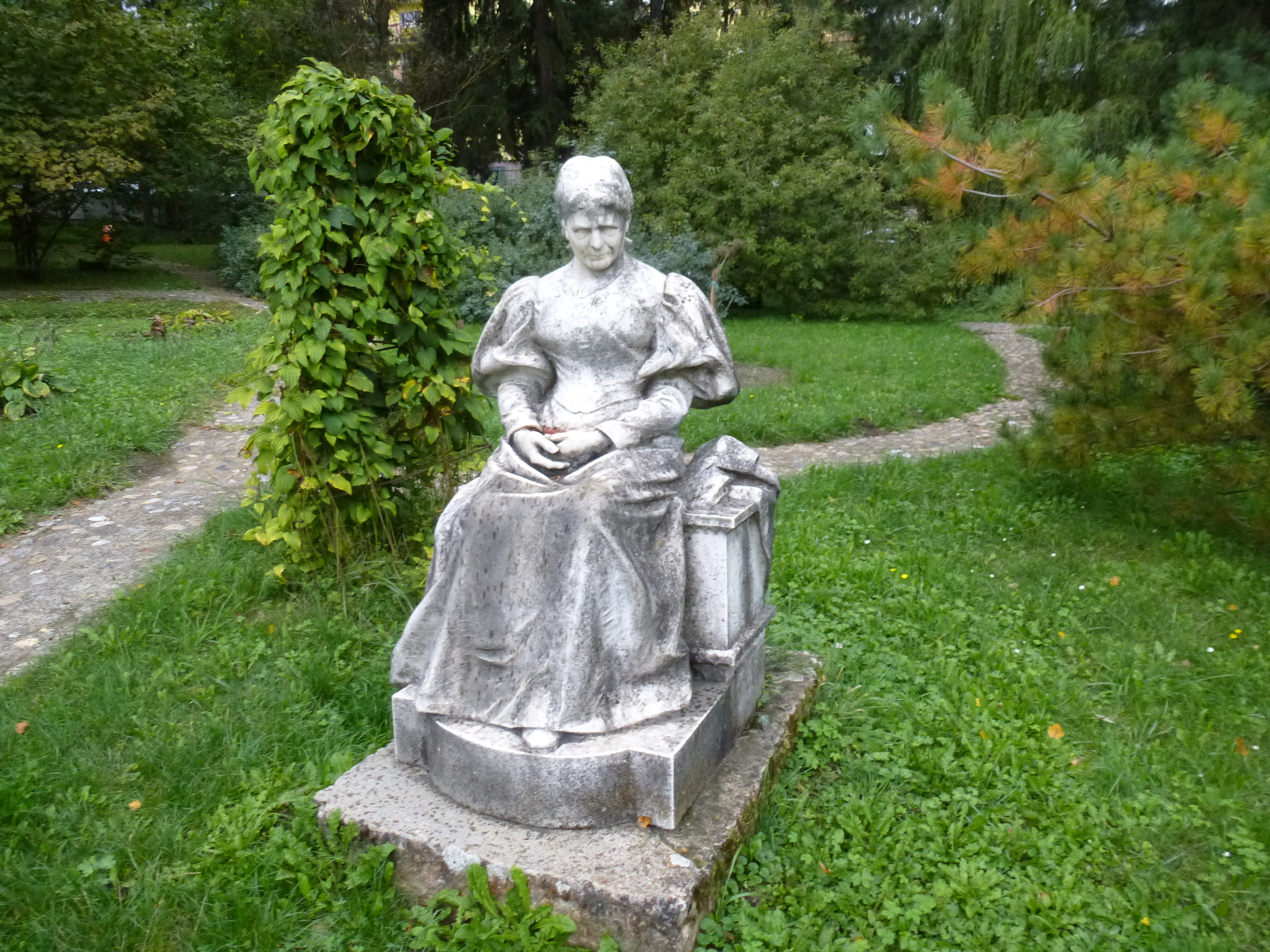 Cluj-Napoca, Grădina Botanică, statuia lui Gyarmathine Hory Etelka, "Marea Doamnă a Călatei".